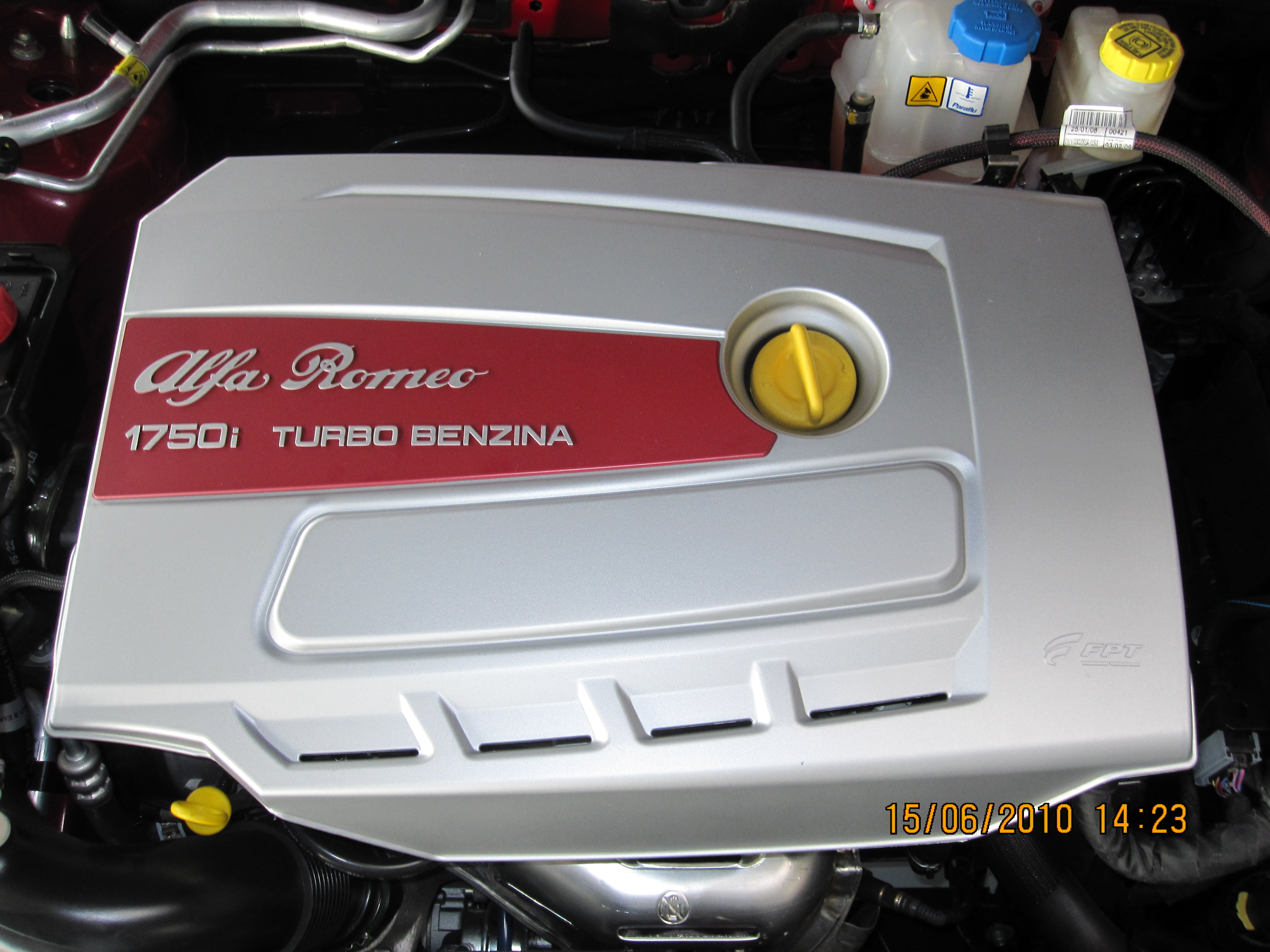 1750 TBi installato in un' Alfa Romeo Brera